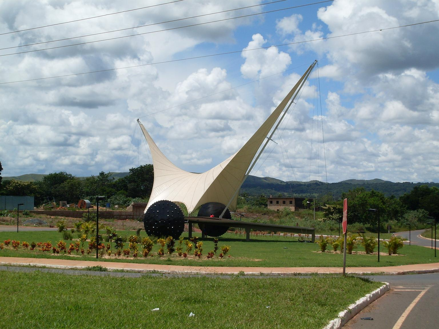 Monumento ao Carro de Boi em Vazante, MG, Brasil